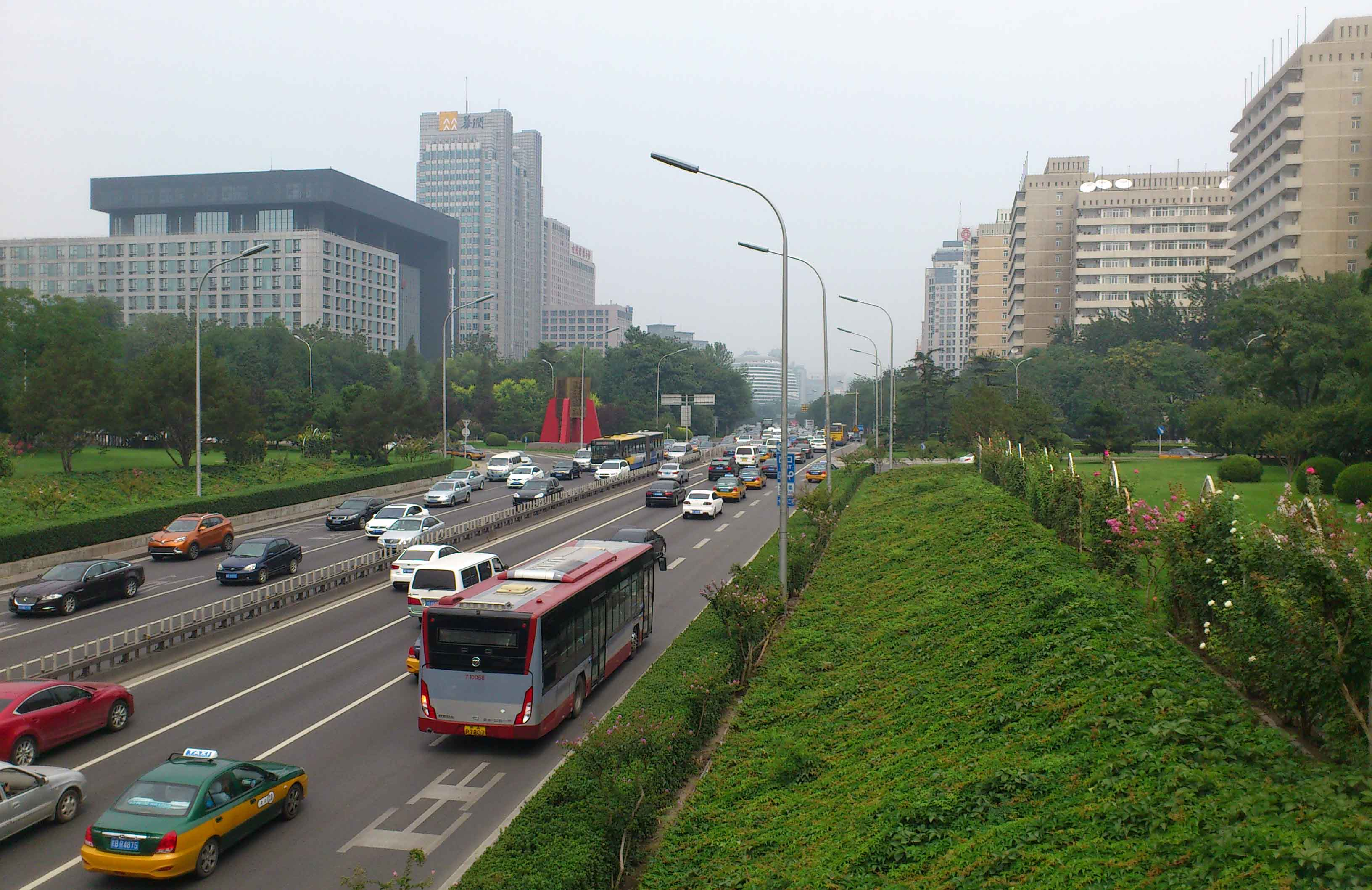 Pekin 2 Ring